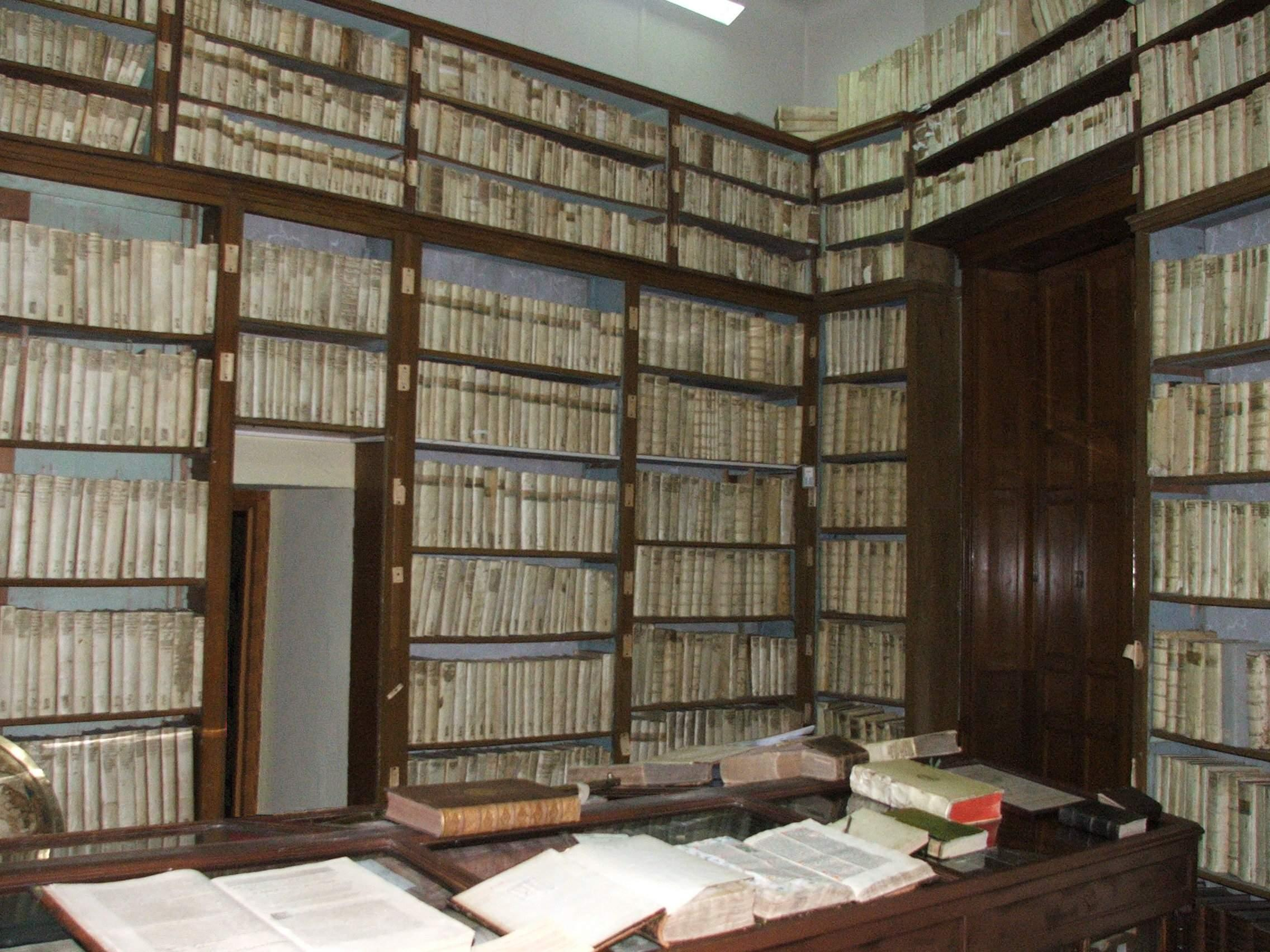 A Főszékesegyházi Könyvtár egyik raktárterme